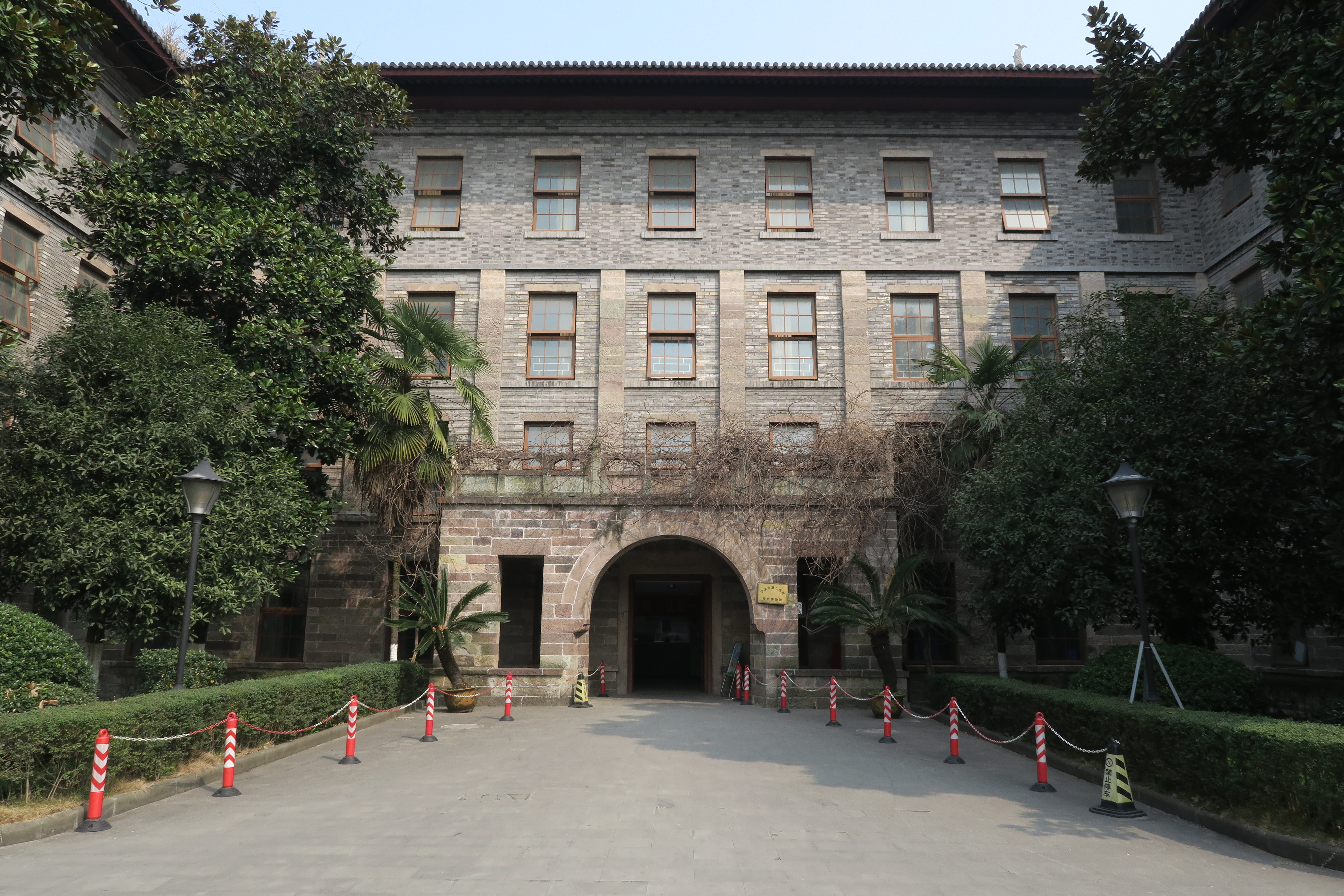 宁波华美医院旧址